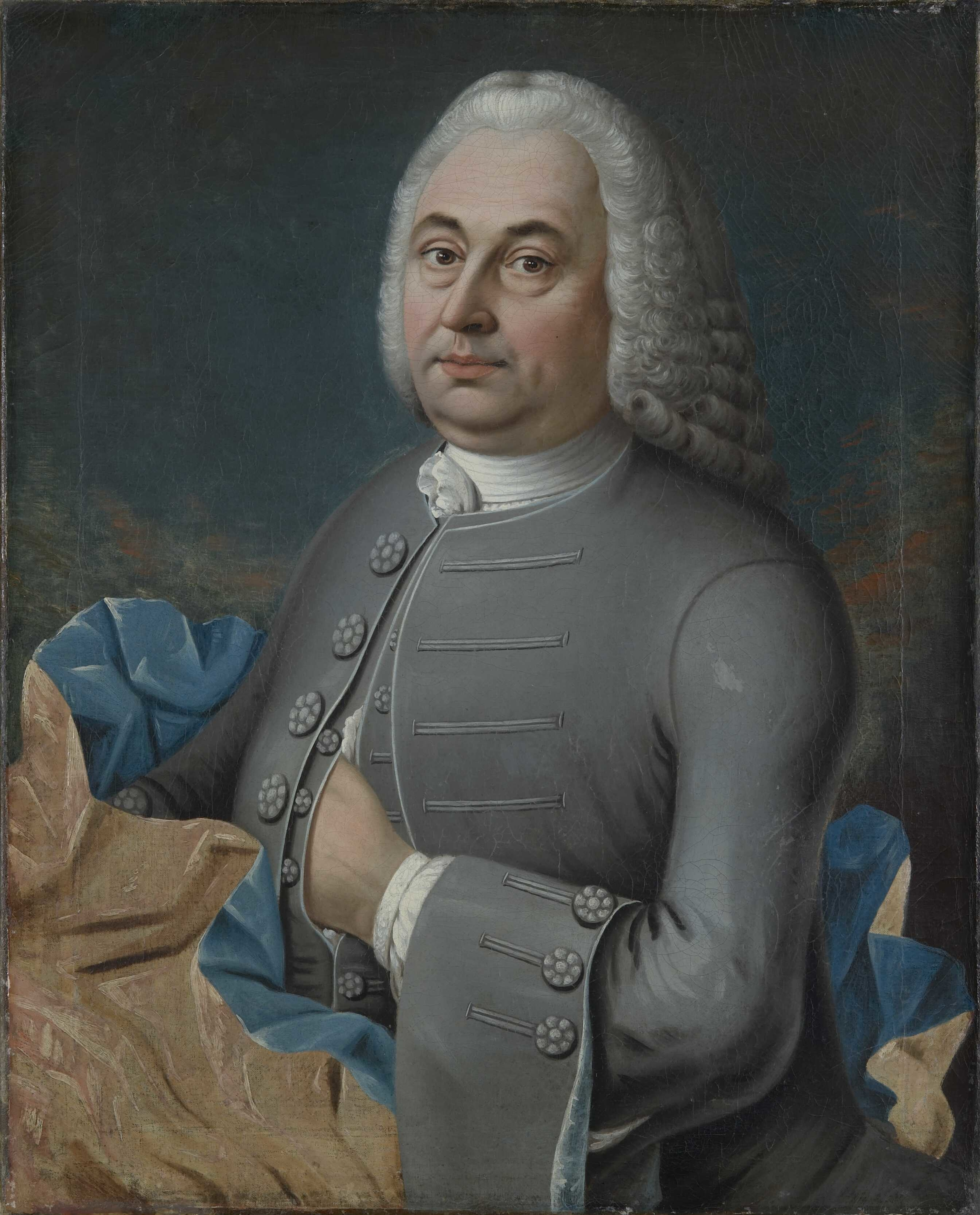 Portrett av sagbrukseier Jess CarlsenJess Carlsen, eier av Nordre Skøyen Hovedgård i Oslo. Jess Carlsens gate i Oslo er oppkalt etter han. Malt av den svenskfødte, norske maleren Eric Gustav Tunmarck (1729-1789). Hoftebilde. 1/4 venstre profil. Parykk gråhvit. Ansikt rosa. Øyne brune. Nese lang. Grå vest og frakk med svarte skygger, besatt med grå knapper foran og på ermene. Venstre hånd stukket inn i vesten. Lys brun kappe foret med blått ligger rundt livet og skjuler høyre hånd. Bakgrunn blågrønn.